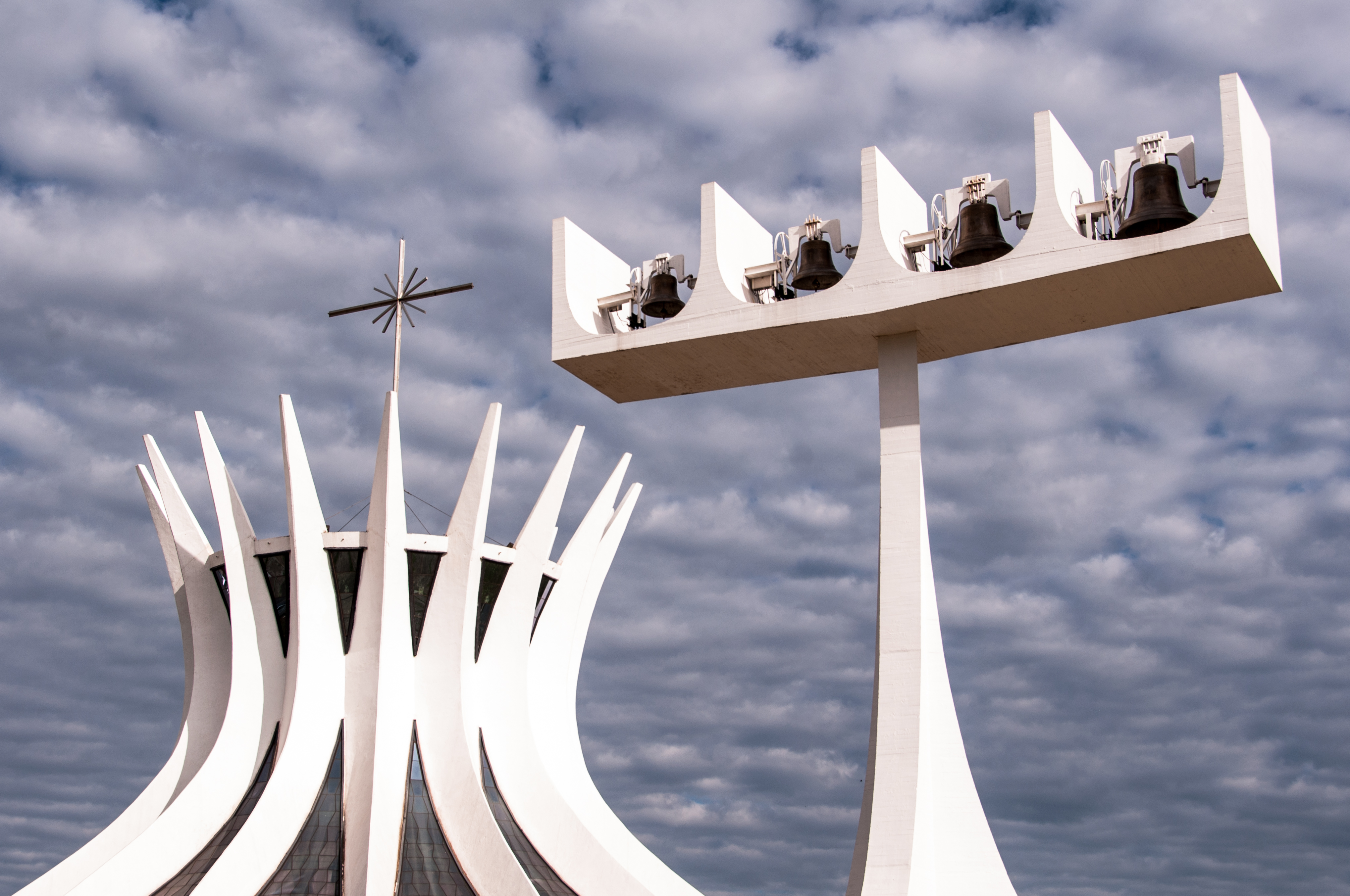 Catedral Metropolitana